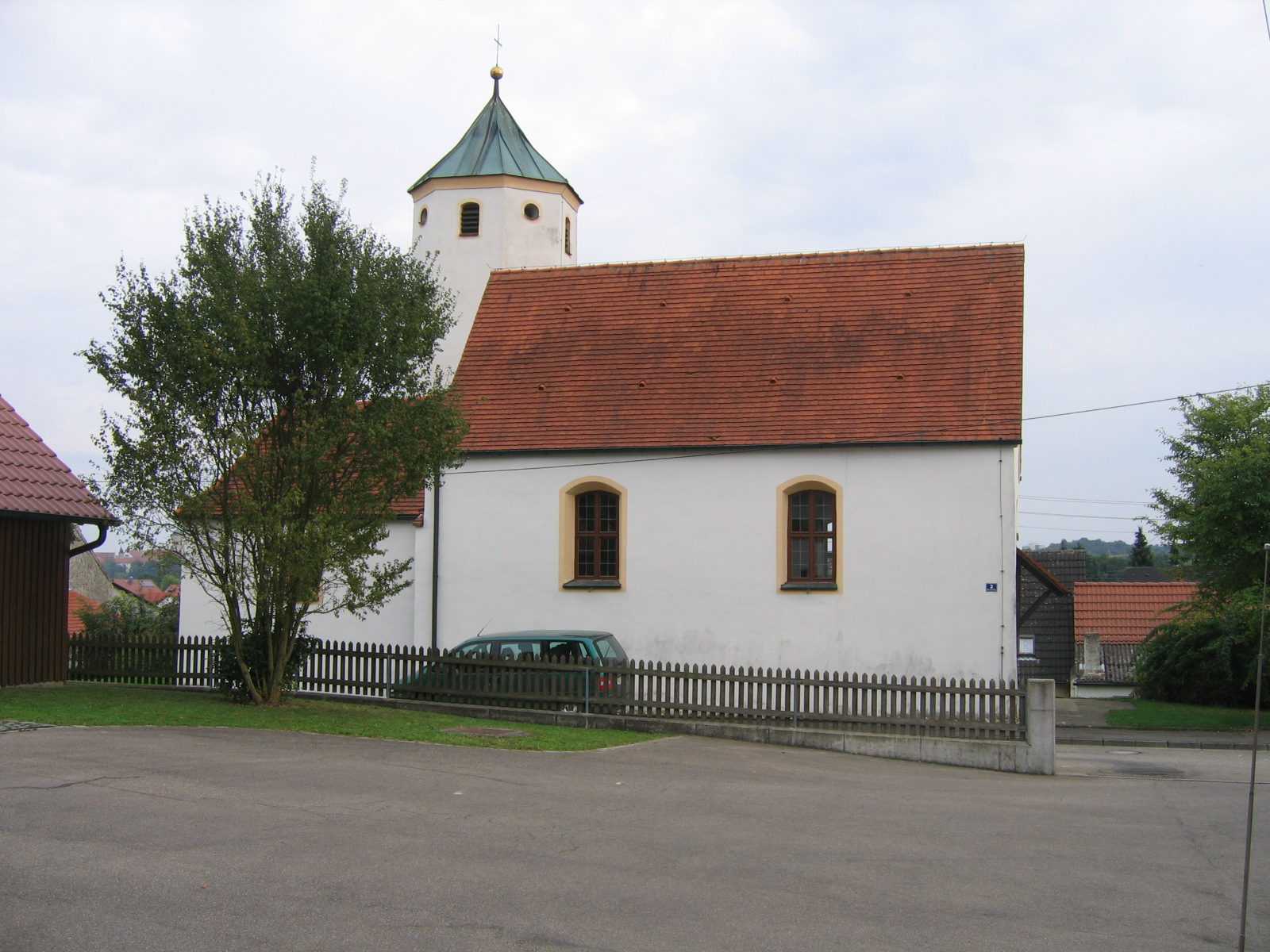 Das Kirchclein von Laisacker